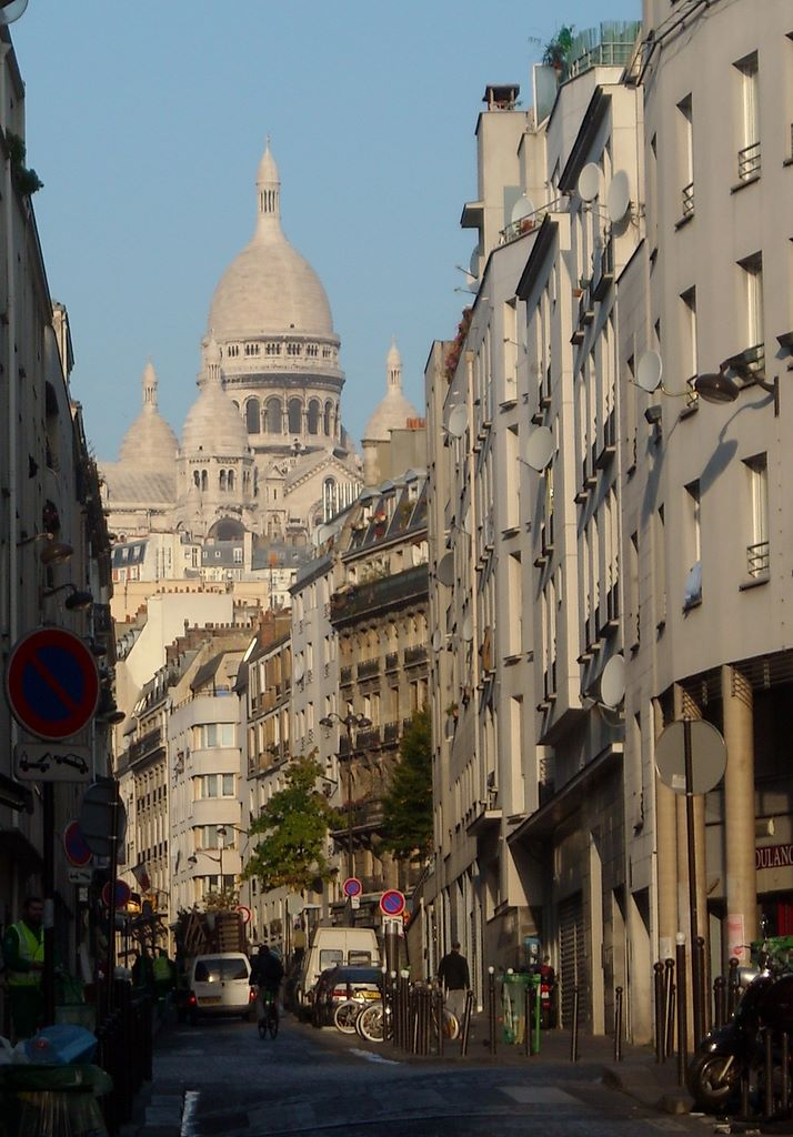 Le Sacré-Cœur depuis la rue de Chartres dans le quartier de la Goutte d'Or (PARIS)